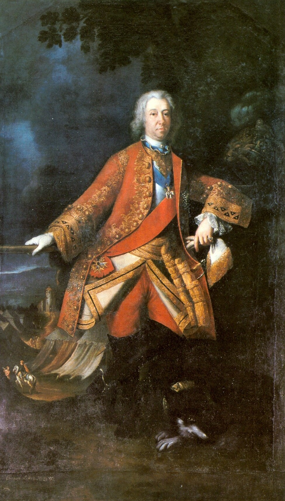 Herzog Eberhard Ludwig (1693-1733), Kaiserlicher General der Kavallerie, seit 09. 07. 1703 Reichsgeneral der Kavallerie, seit 09. 09. 1712 (ev.) Reichsgeneralfeldmarschall